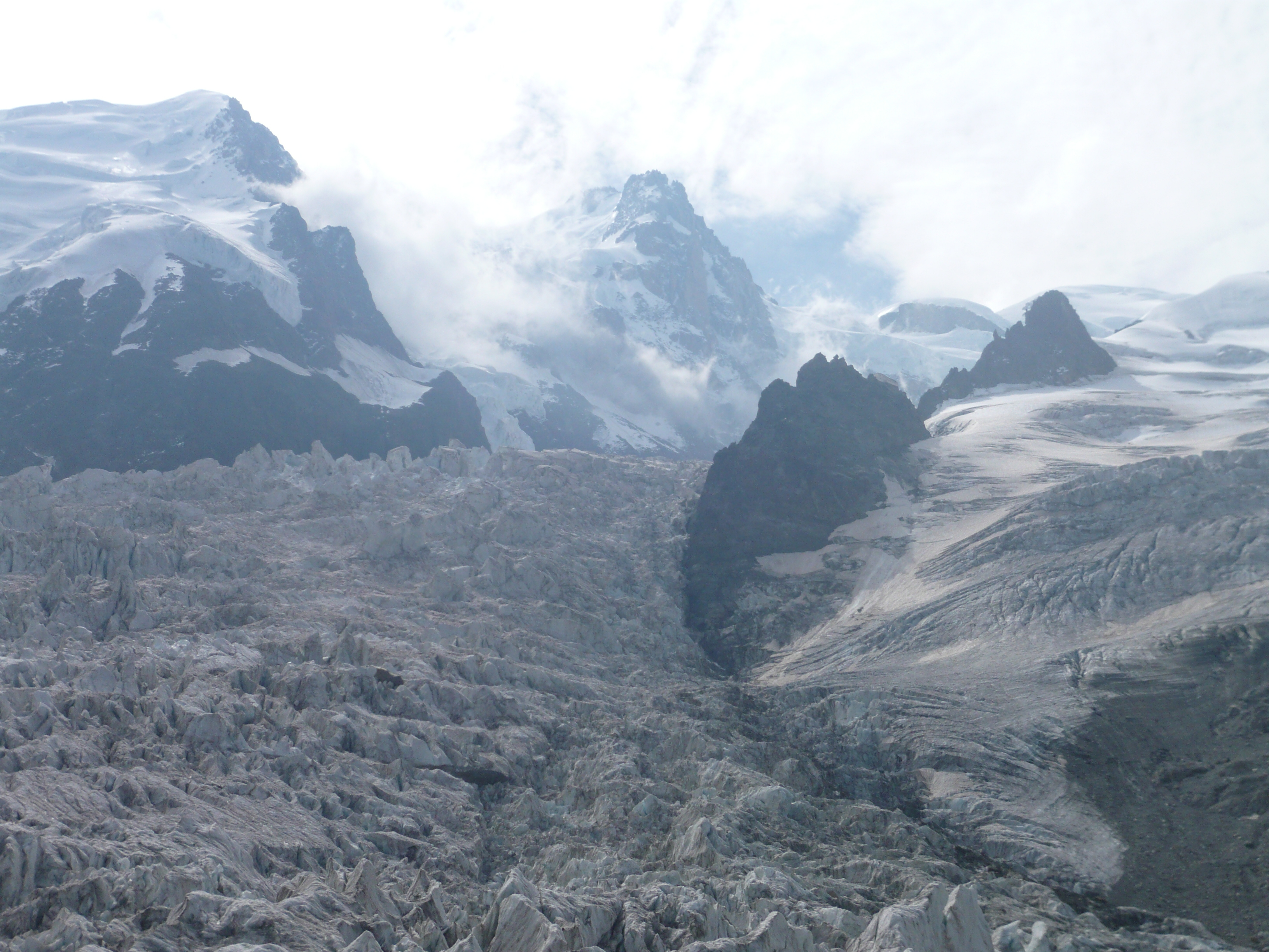 LES Grands Mulets Refuge CAF